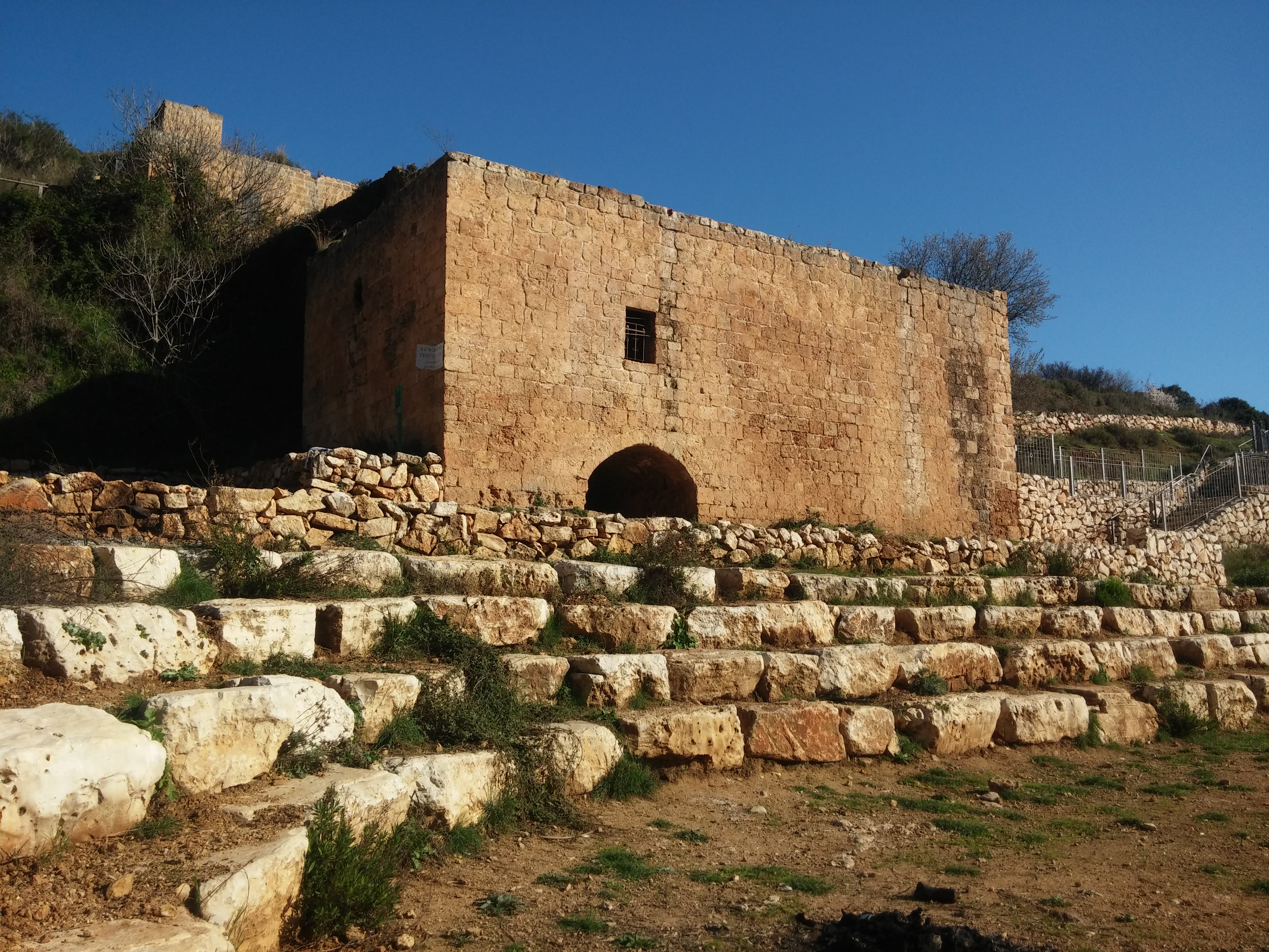 גן לאומי נחל צלמון, טחנות קמח, מים זורמים. Tzalmon Valley, Israel